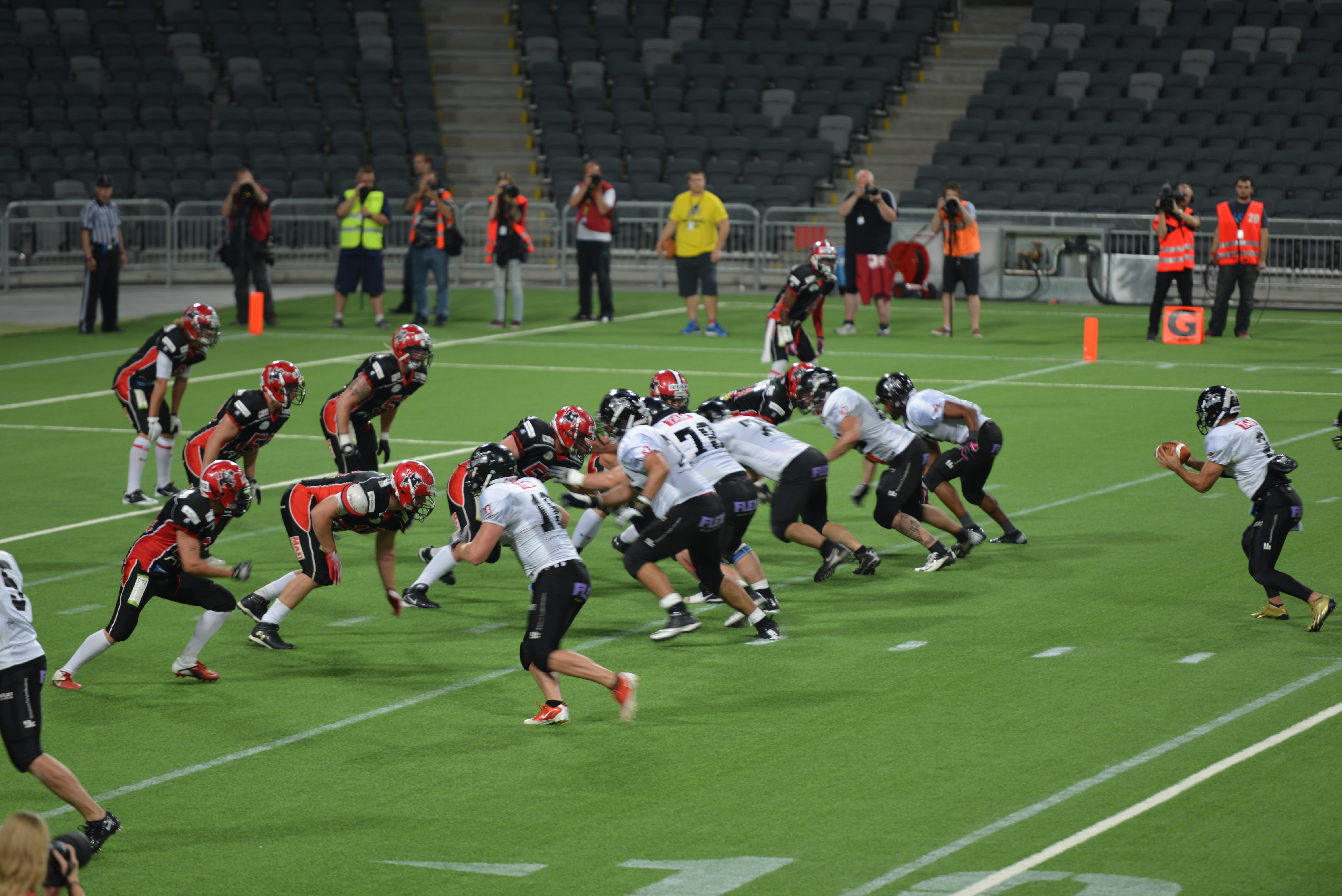 Lagen har precis börjat spela.